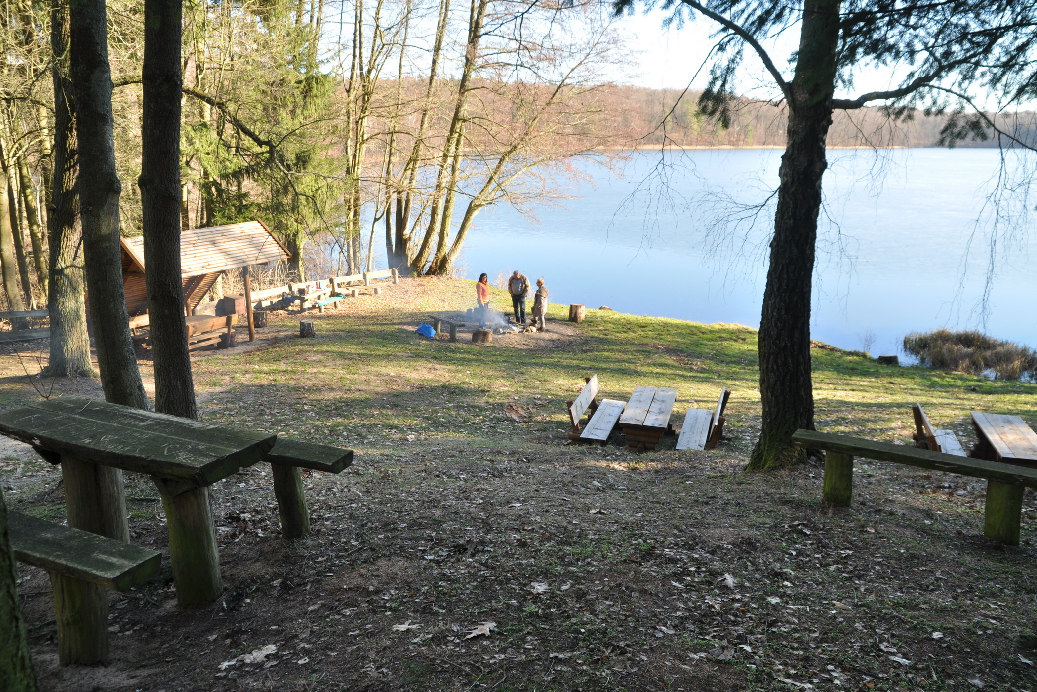 Jezioro Sitno Moczydelskie, na terenie Barlinecko-Gorzowskiego Parku Krajobrazowego. Na foto. miejsce biwakowe nad jeziorem